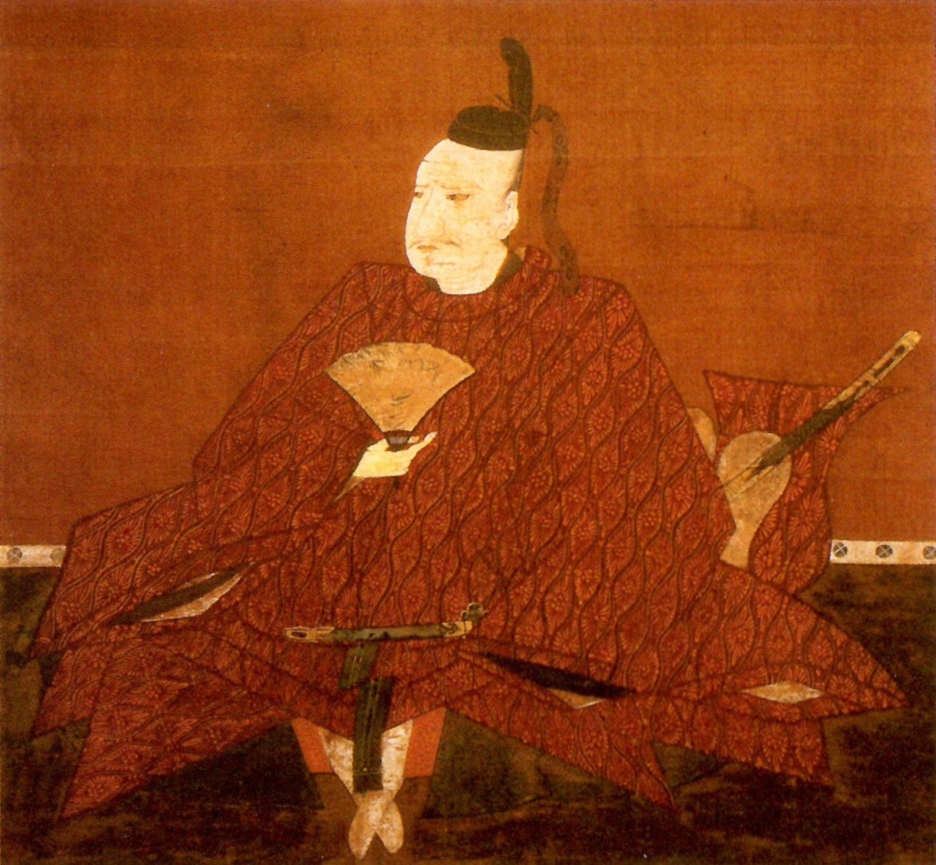 松平家清の肖像。